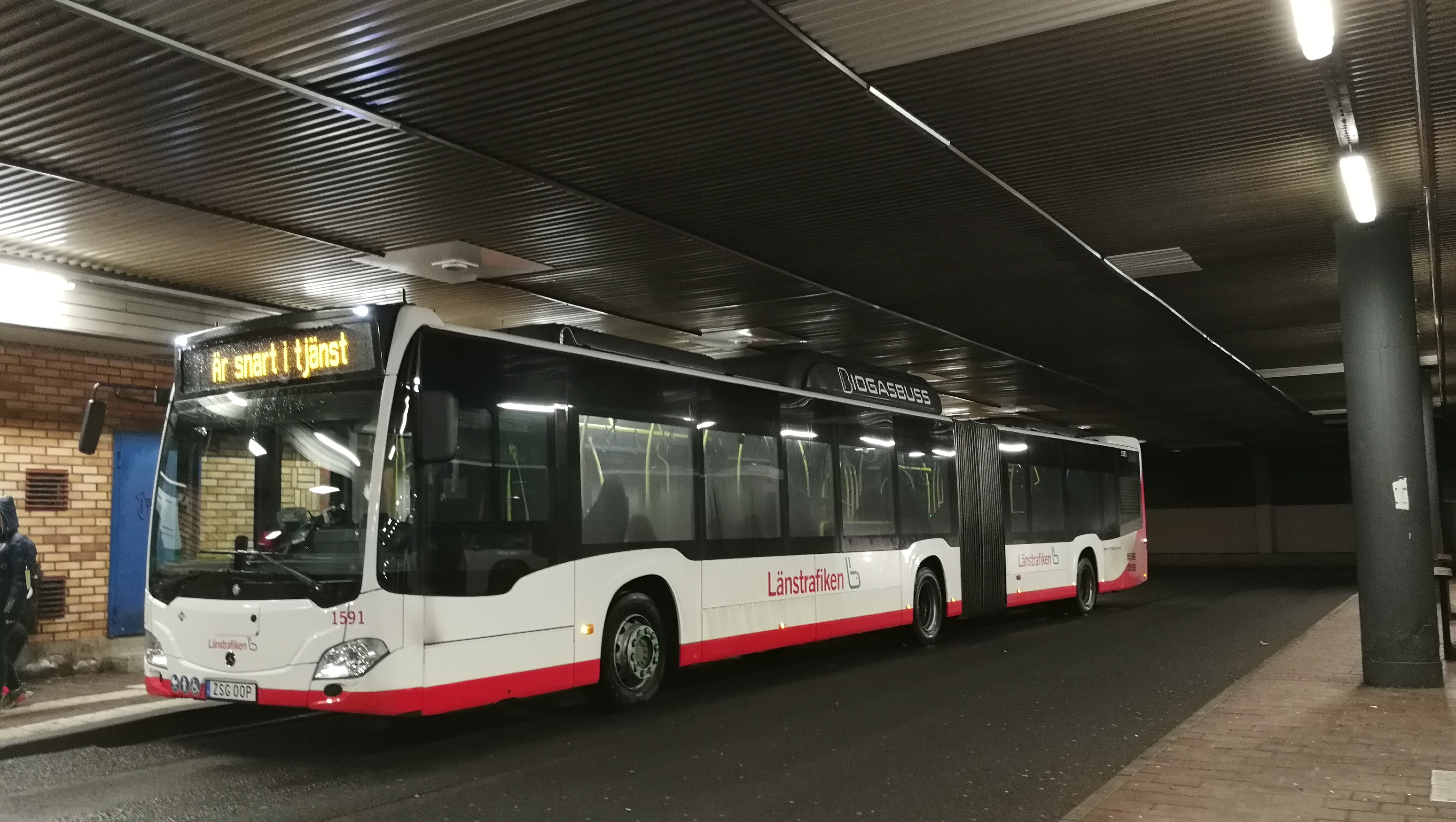 Jönköping Stadsbuss Mercedes Benz Citaro 2 G vid Råslätts Centrum